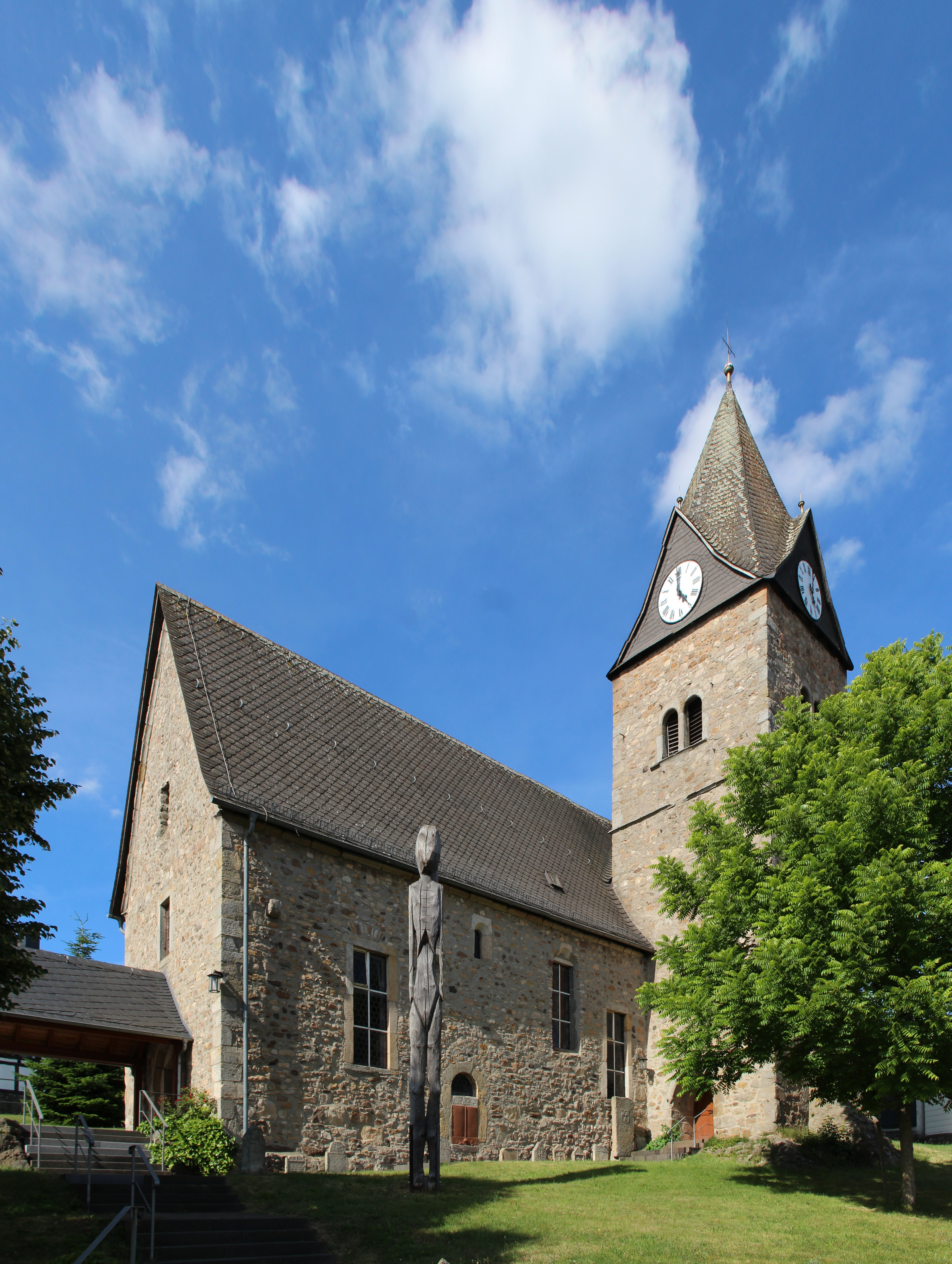 Treis an der Lumda